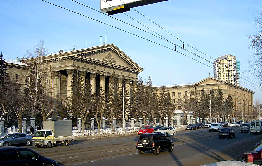 Сибирский государственный университет путей сообщения (СГУПС)